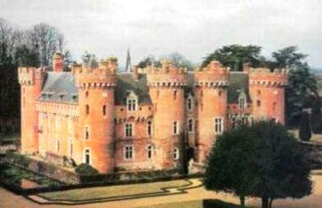 Reproduction du Château de Villebon (28190), publicité des chocolats Guérin-Boutron, 19e siècle.